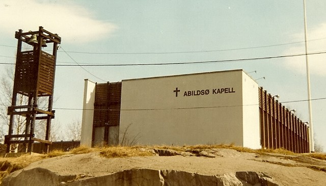 Abildsø kapell